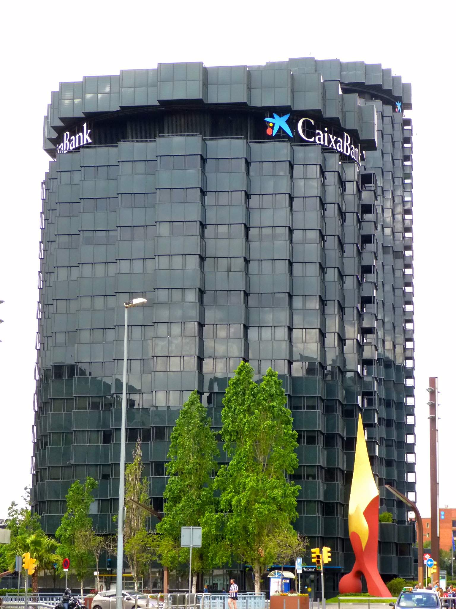 Barcelona - Torres La Caixa